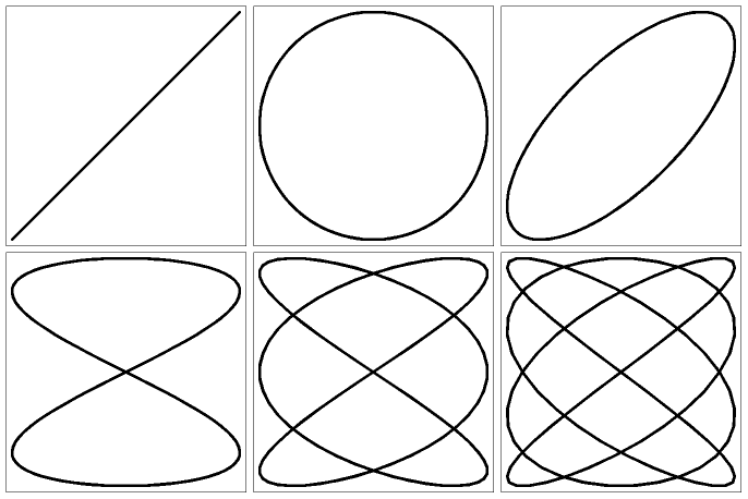 фигуры Лиссажу